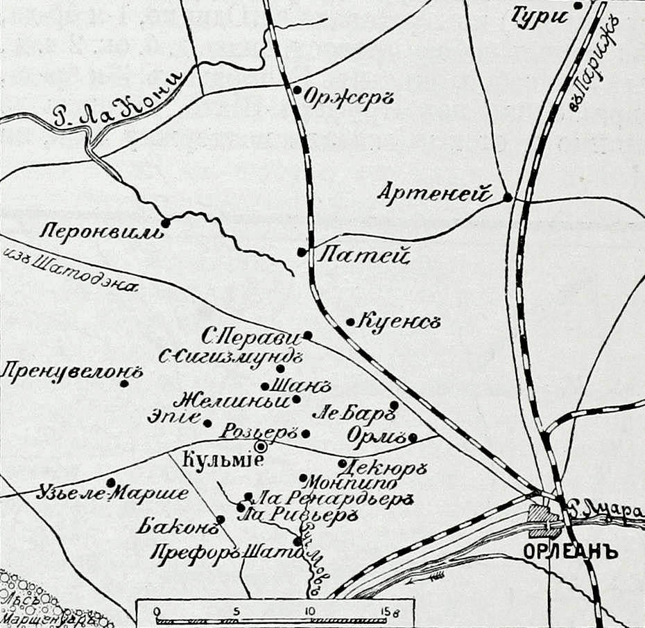 Данное изображение было использовано в статье «Кульмие» опубликованной в 14-ом томе «Военной энциклопедии», который был издан книгоиздательским товариществом Ивана Дмитриевича Сытина в 1914 году в столице Российской империи городе Санкт-Петербурге.